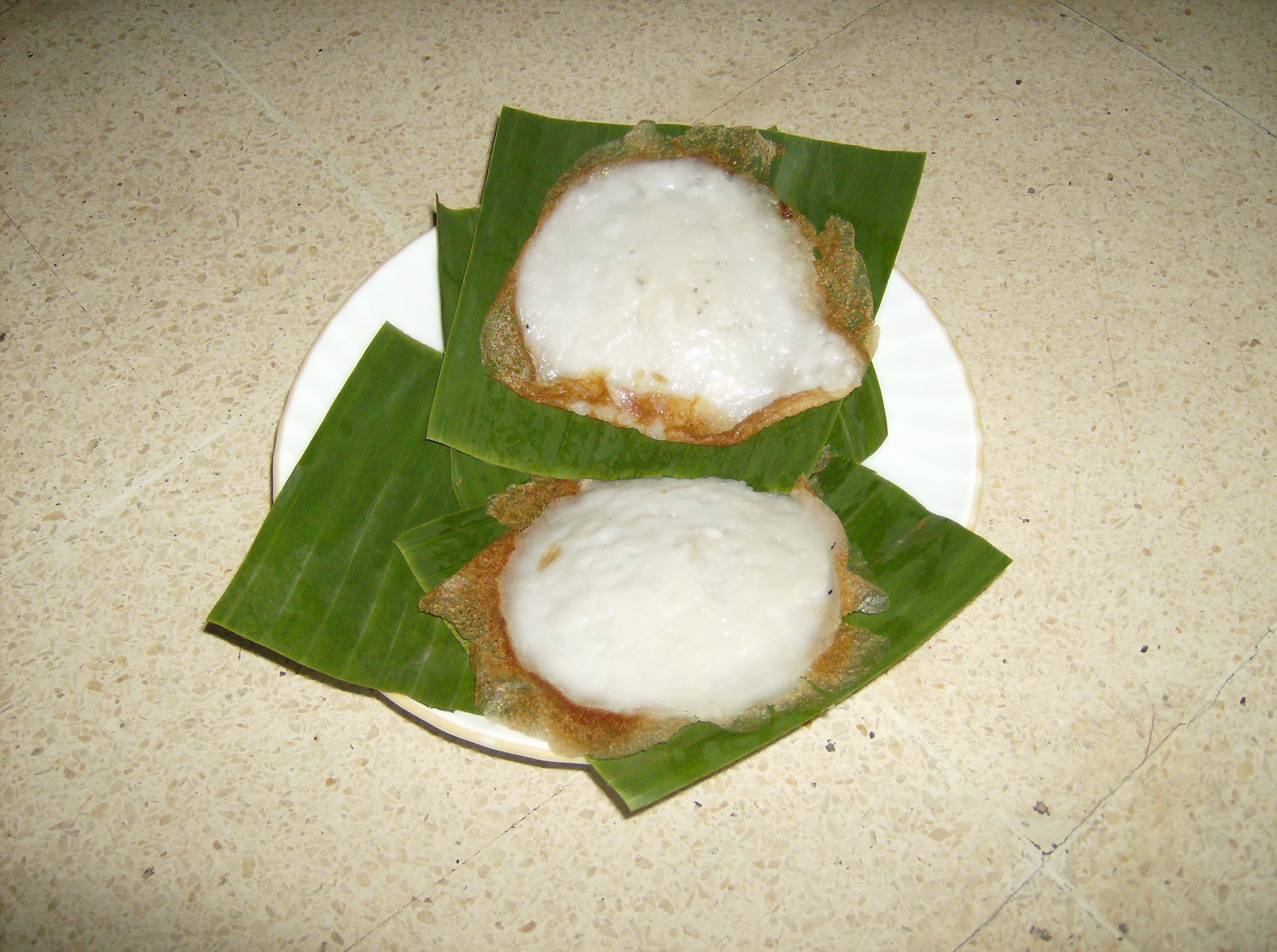 Srabi Solo, an Indonesian cake from Surakarta (Solo) in Central Java